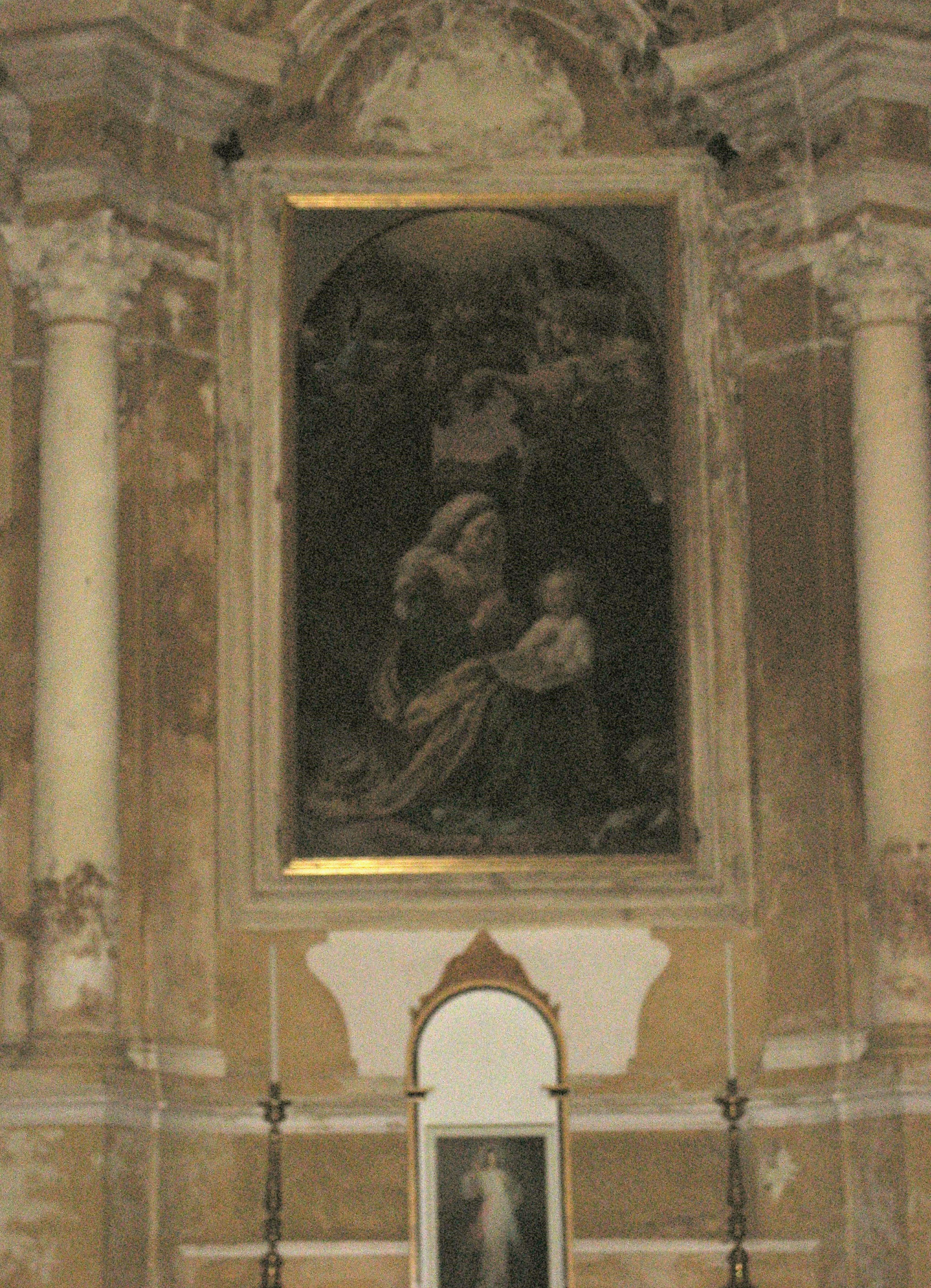 La barocca Cappella di Sant'Anna nella chiesa di San Francesco ad Atri.